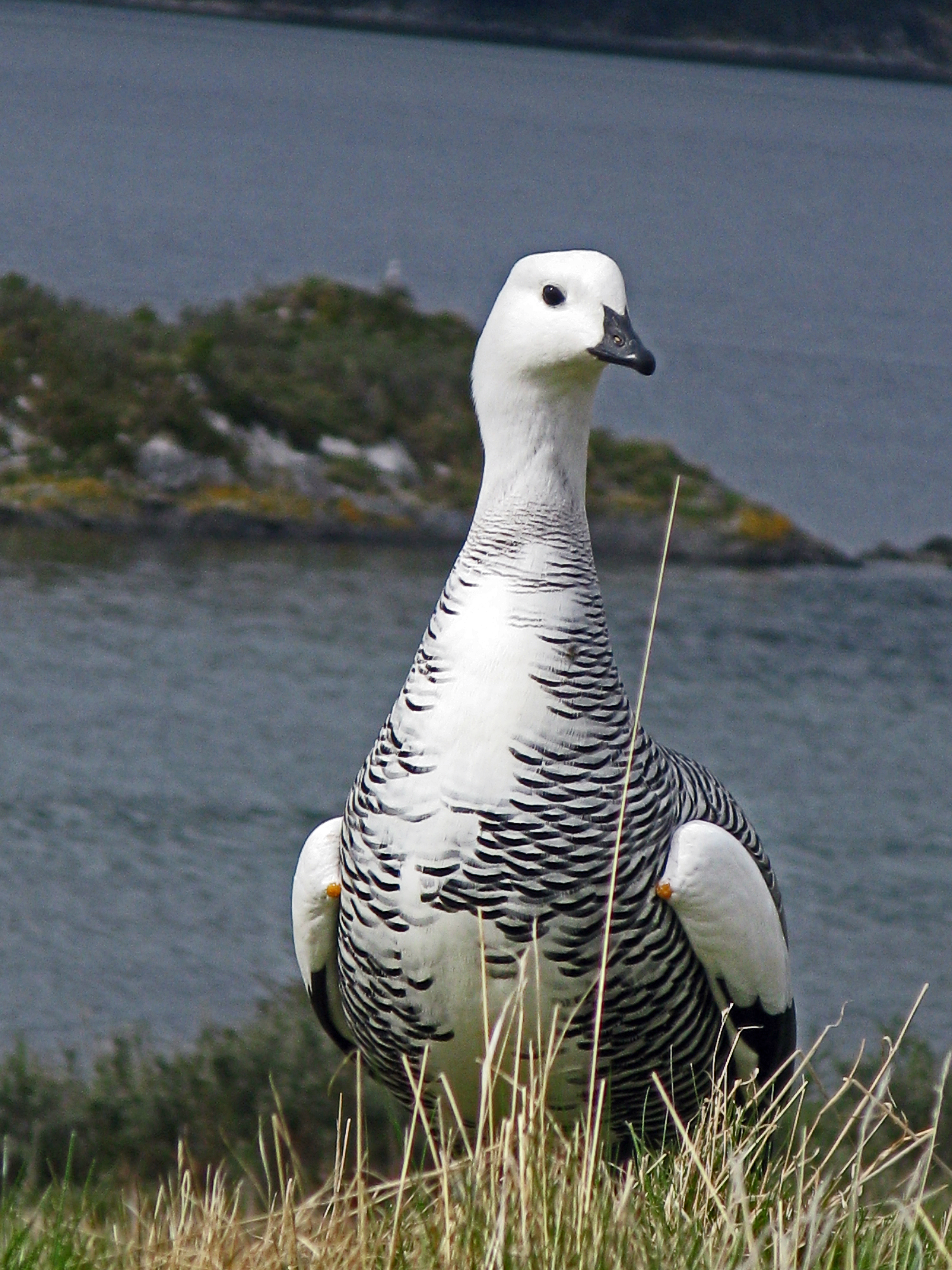 Oie (chloephaga picta) - mâle - Parc national de la Terre de Feu - Argentine